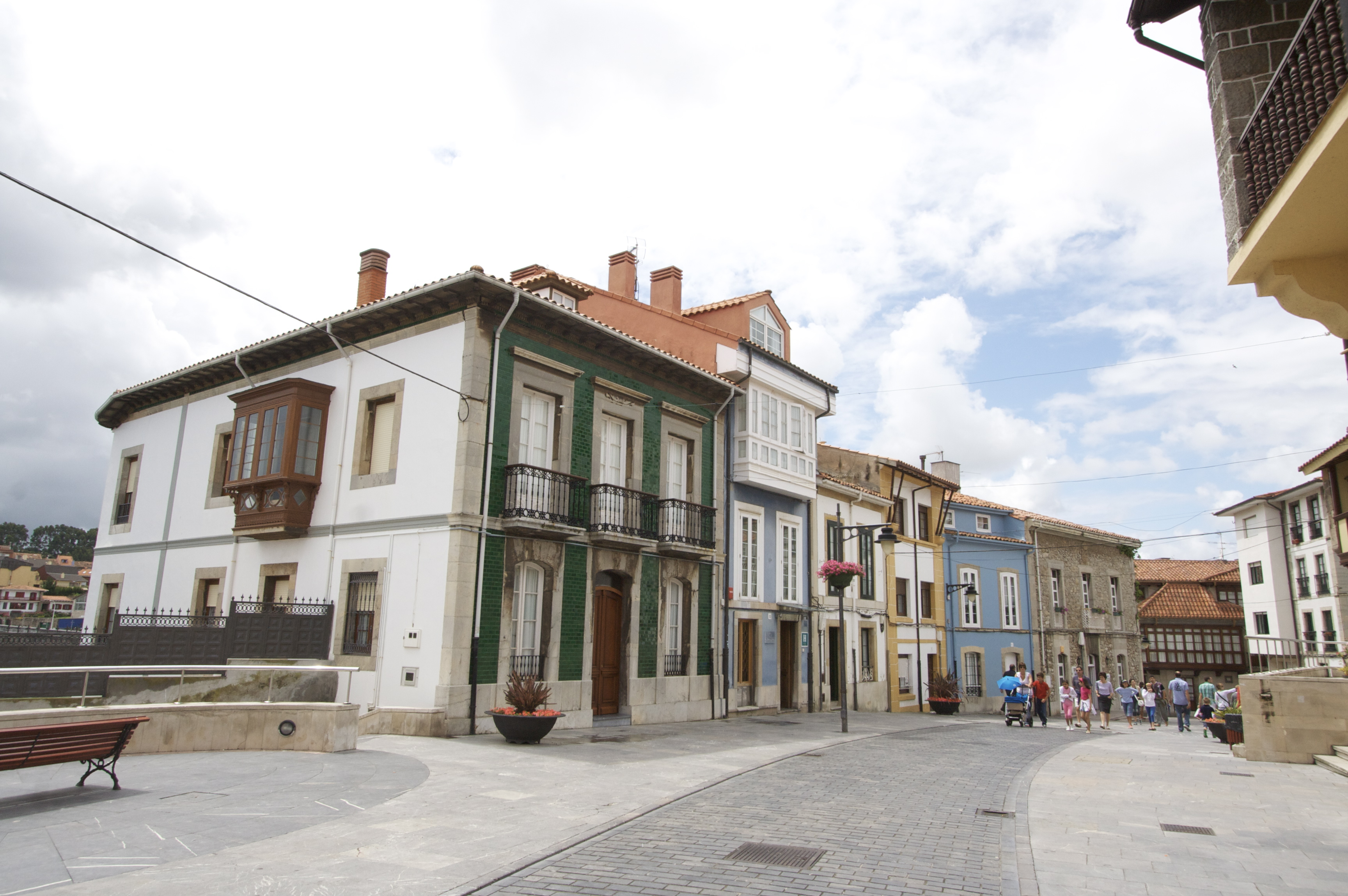 Casco antiguo de Luanco, Gozón